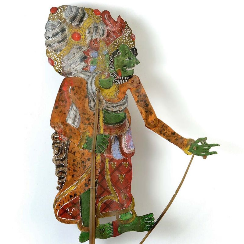 Schaduwfiguur. Wajangfiguur voorstellende de god Wisnu Unknown language: Wayang purwa